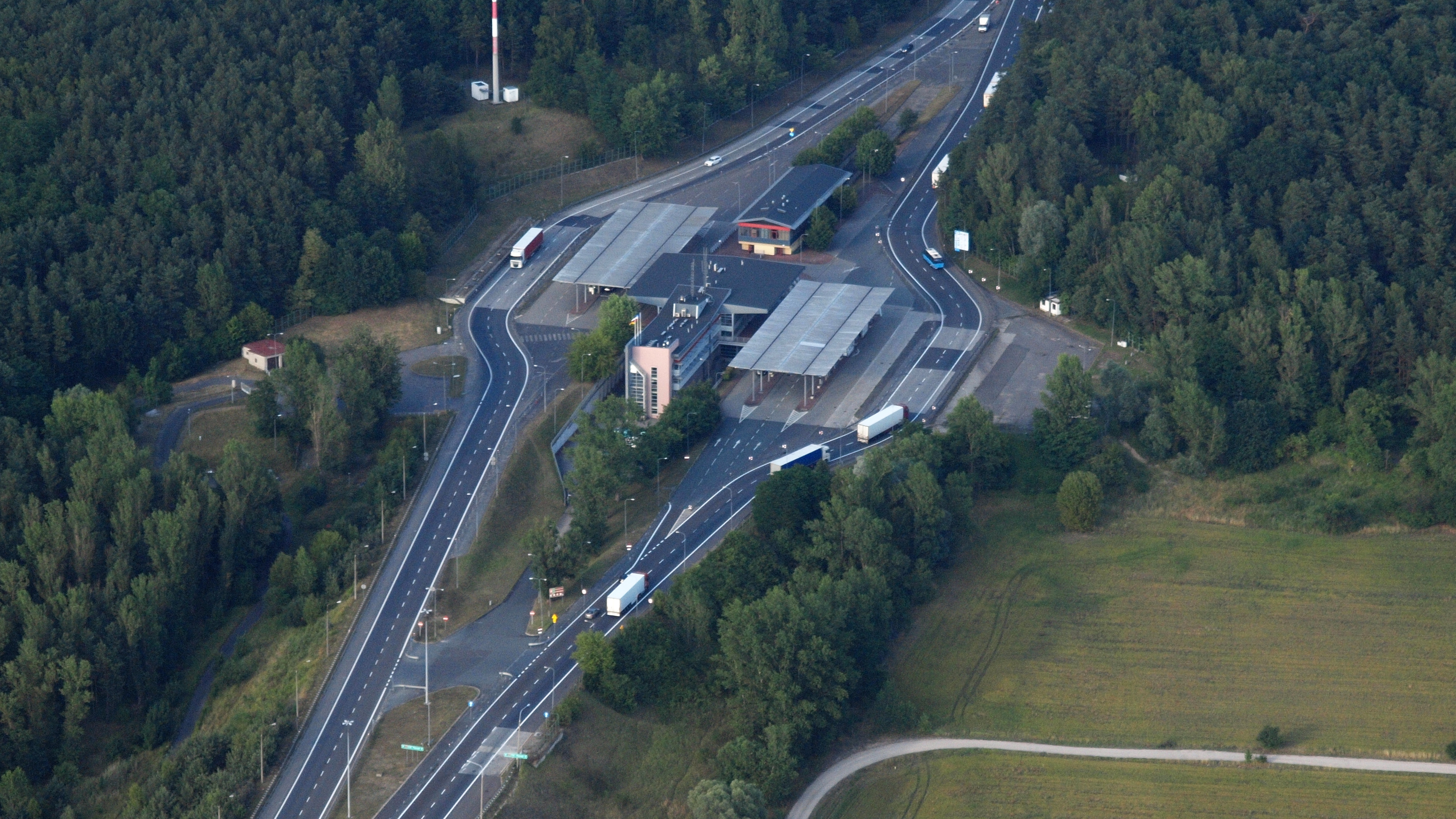 Frankfurt (Oder) Autostrada A2 (Polen), Grenzübergang DPL – Świecko, Luftaufnahme (2015)